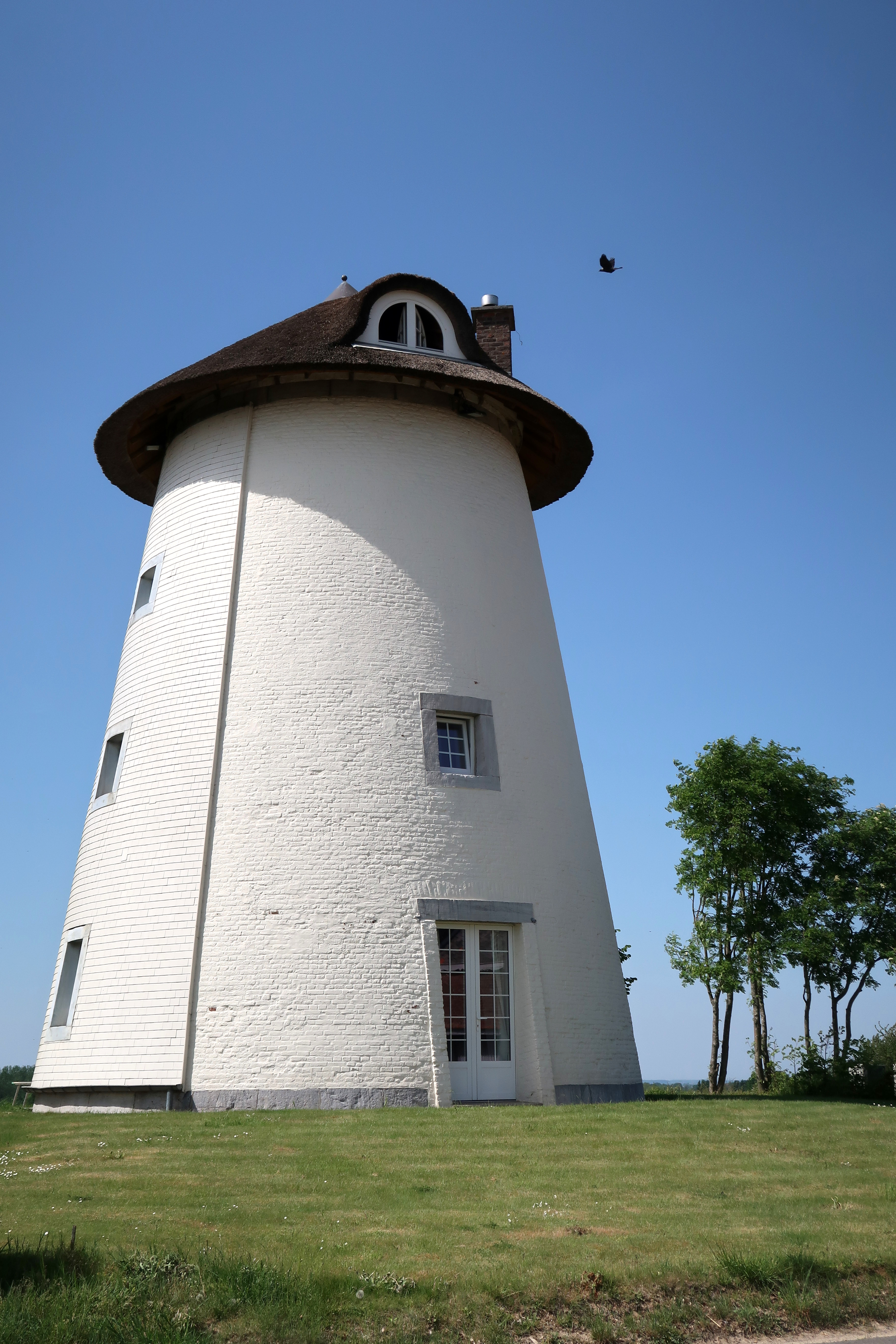 In 1366 stond er op de hoogte in Corswarem al een windmolen. In 1770 werd ze in steen herbouwd. Ze werkte tot 1918. Momenteel is het woning.